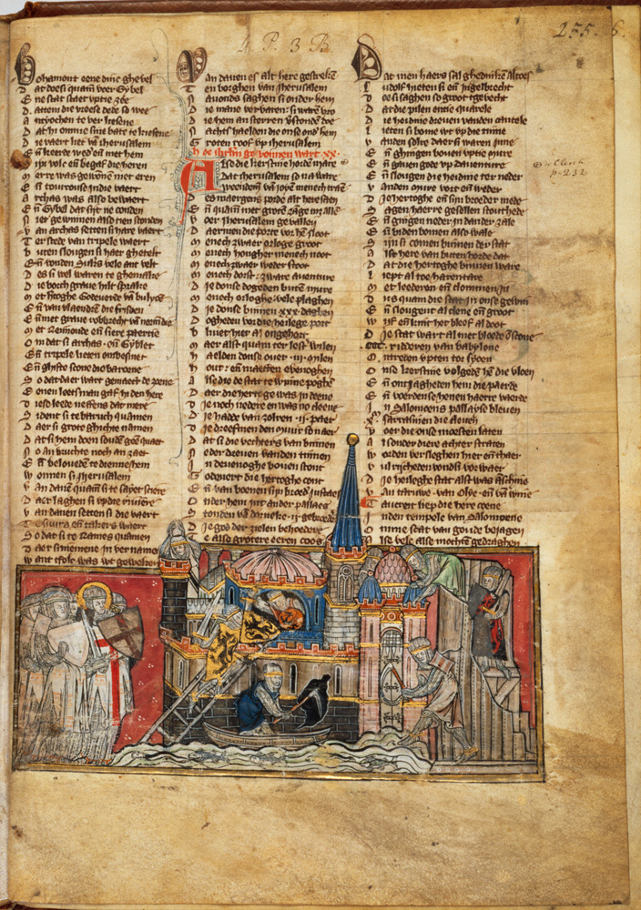 Spiegel Historiael of Jacob van Maerlant, West-Flandern